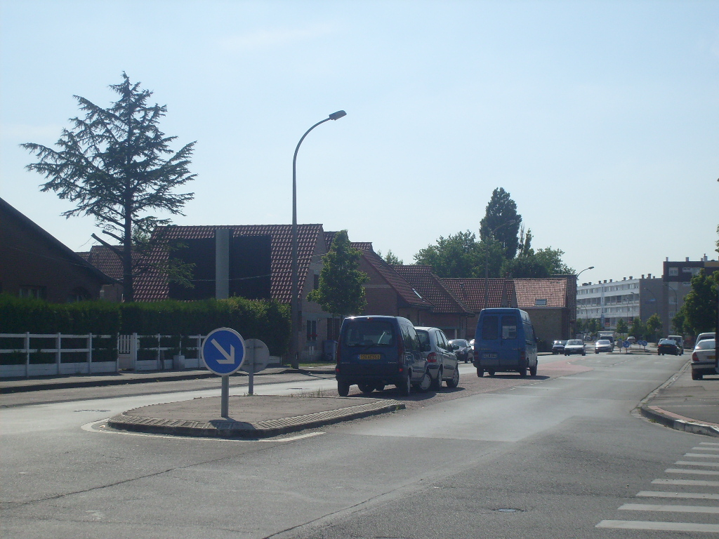 Petite-Synthe(Dessinguez)